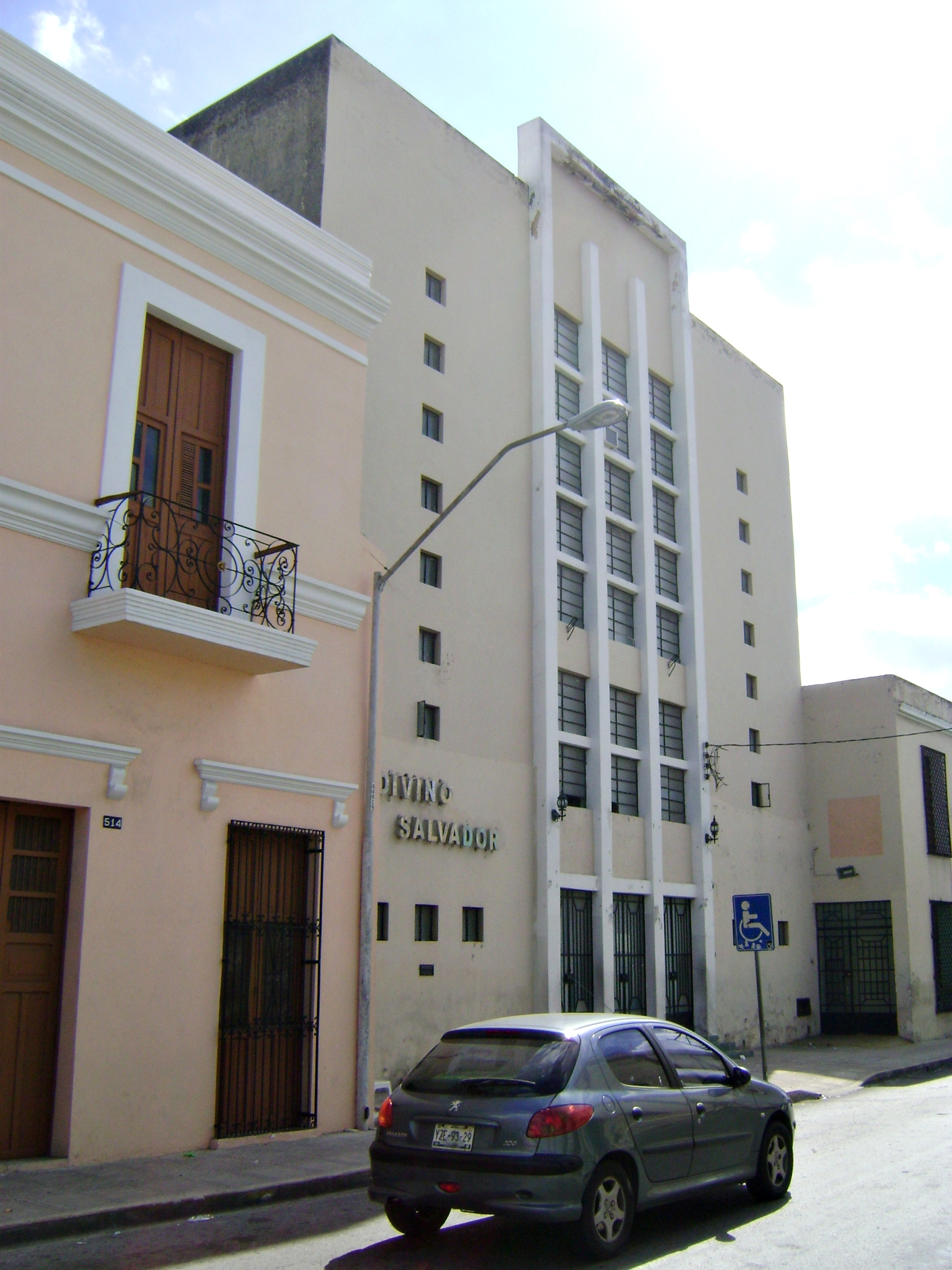 Iglesia Nacional Presbiteriana de México El Divino Salvador Col. Centro Calle 66 #518 entre 63 y 65 Mérida Yucatán